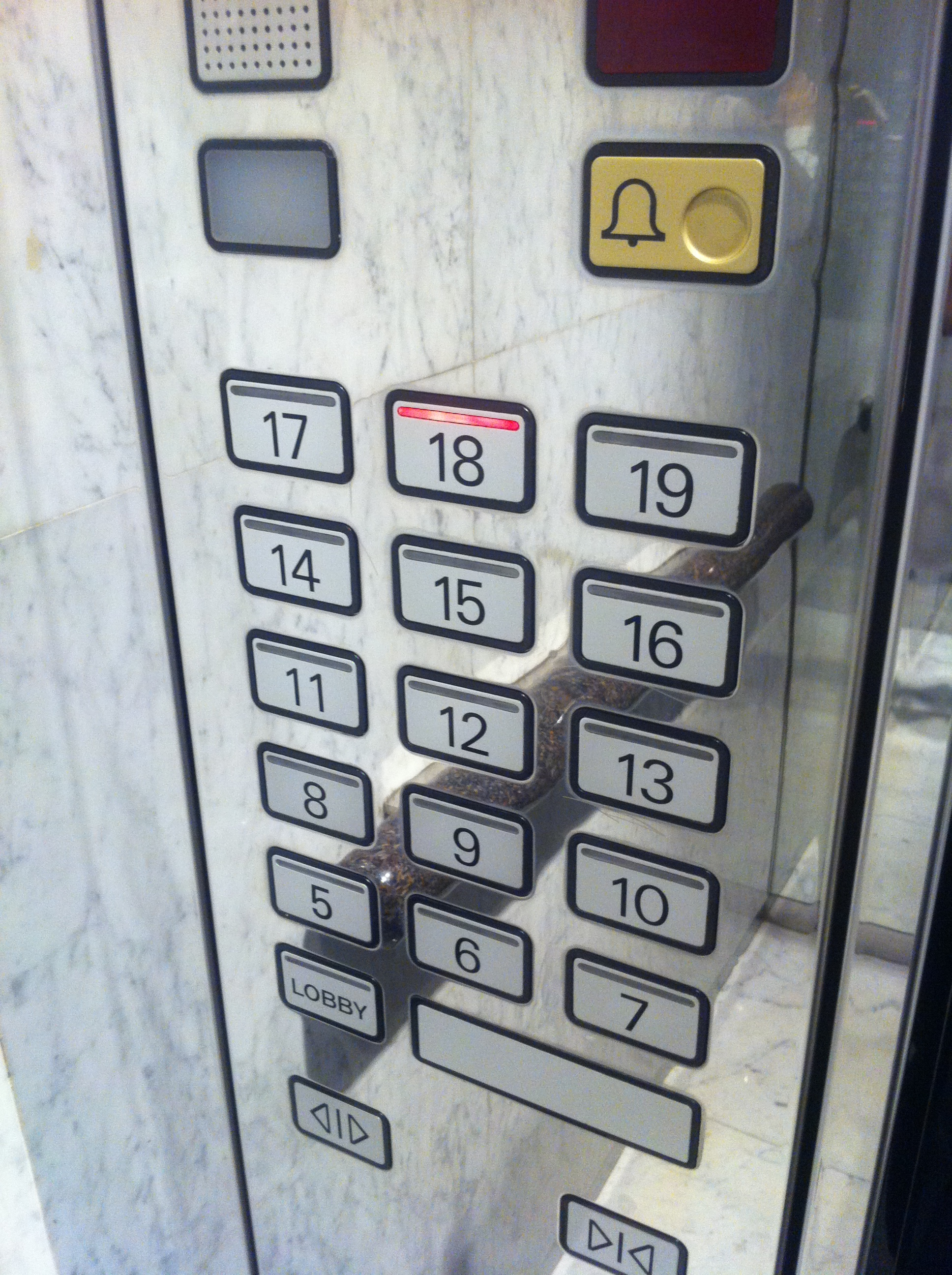 中文（香港）: 香港島金鐘 太古廣場